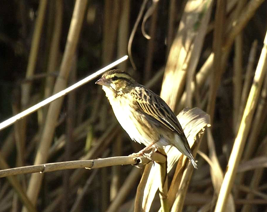 Petronia petronia